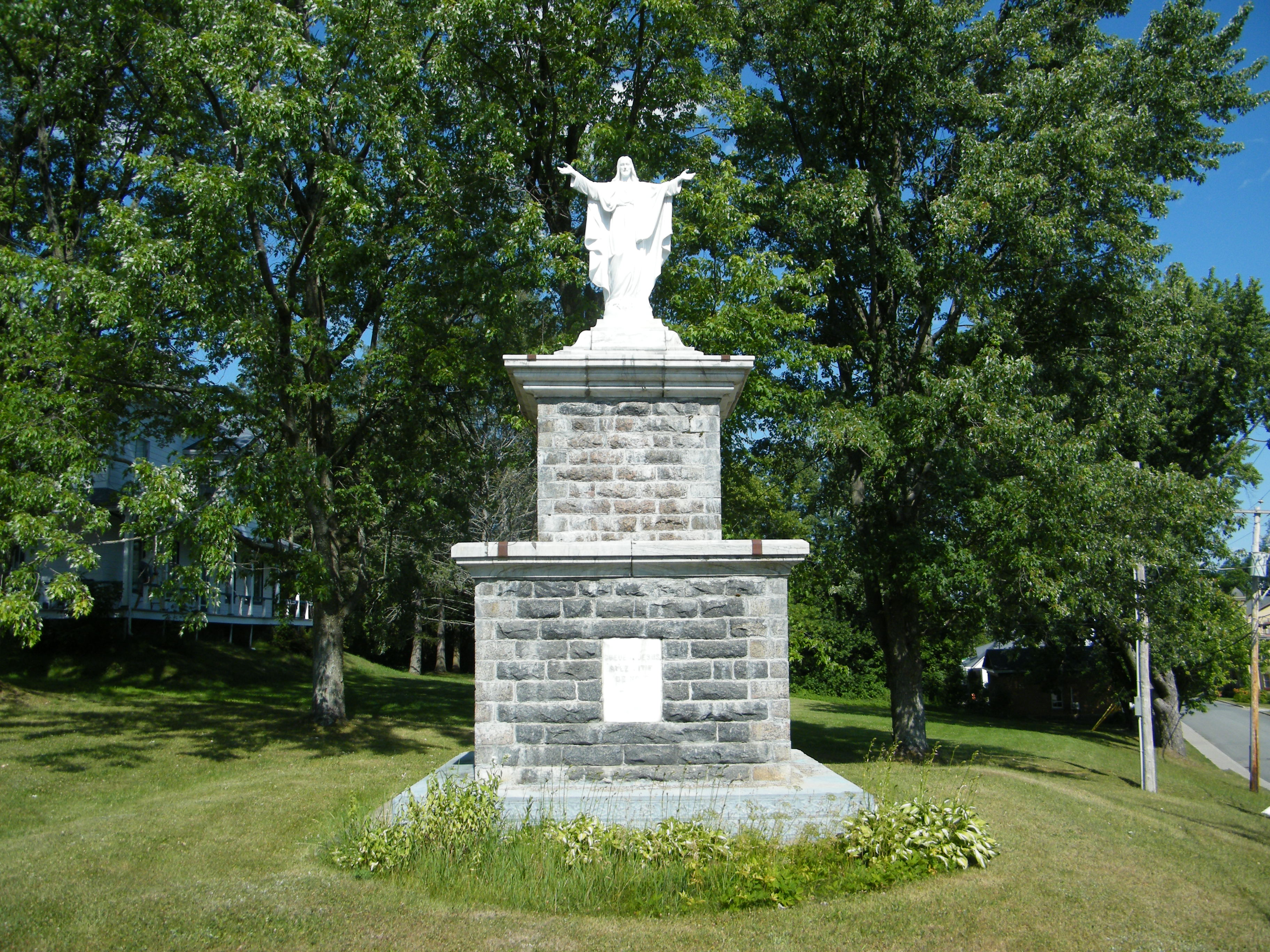 Monument au Sacré-Coeur, érigé devant l'église Sainte-Geneviève, à Sainte-Geneviève-de-Batiscan, dans la MRC des Chenaux, en Mauricie, Québec.